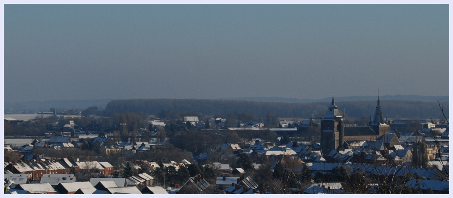 Soignies sous la neige